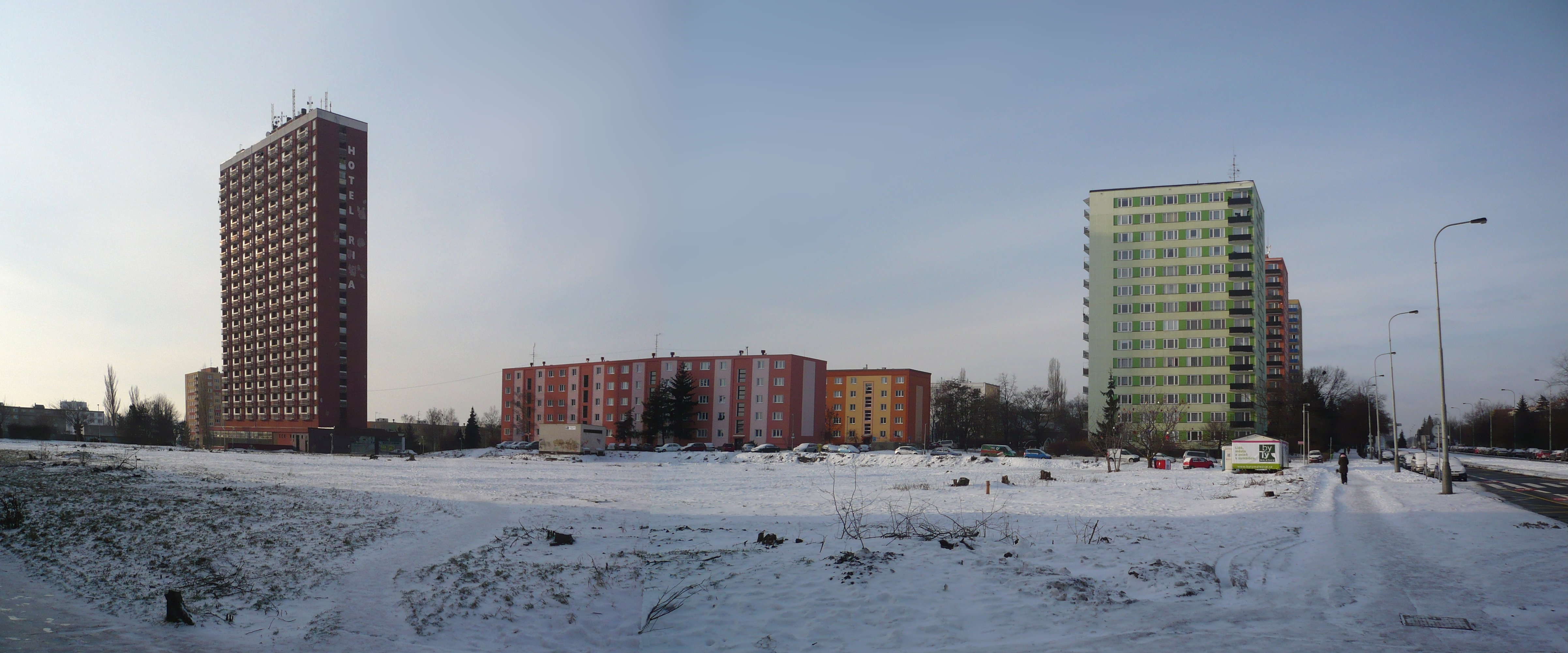 Stavební parcela 806/630 v Praze-Malešicích (vlastník SIDI PRAGUE, s.r.o., viz Sidi Investments)